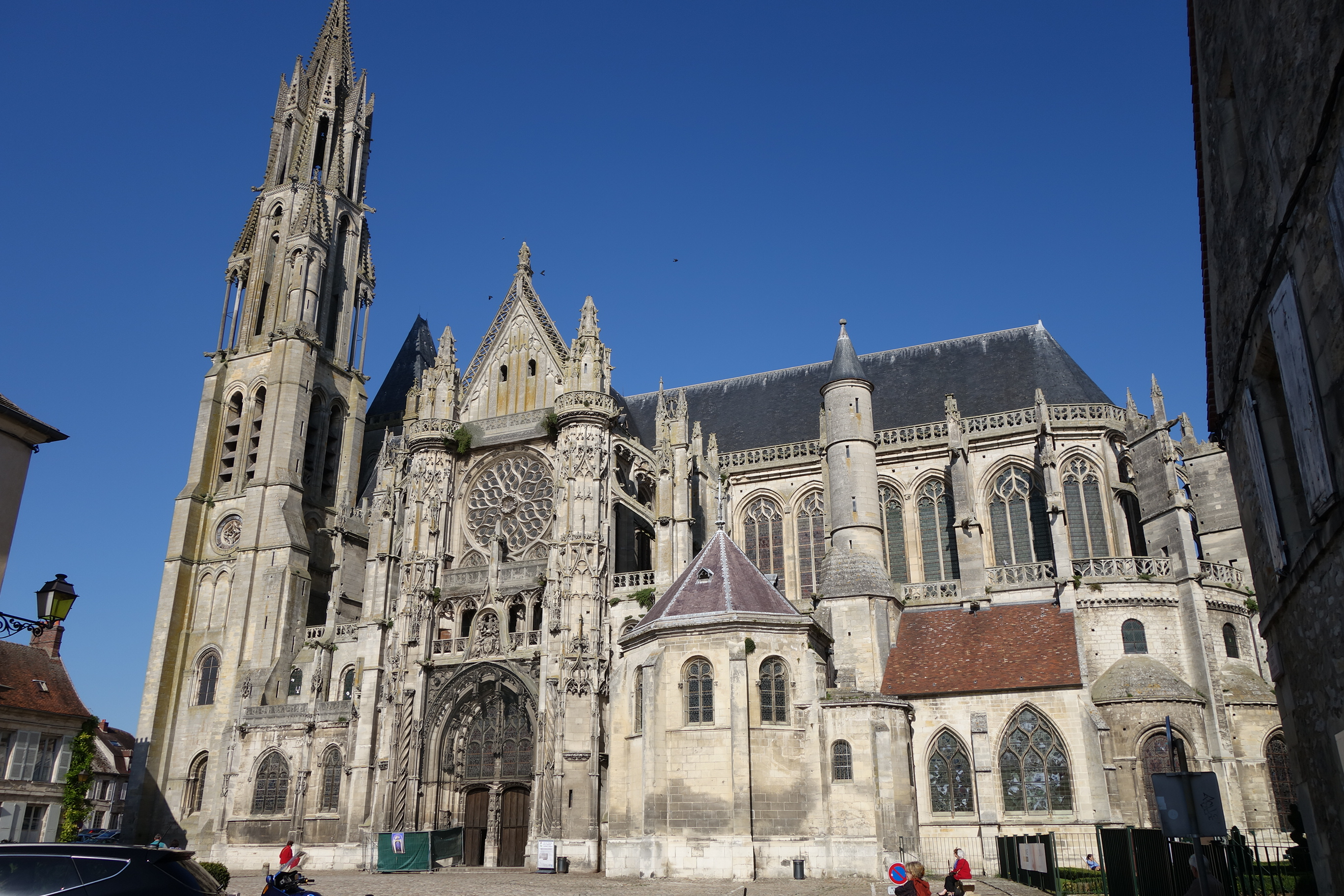 Cathédrale Notre-Dame de Senlis, vue du sud.